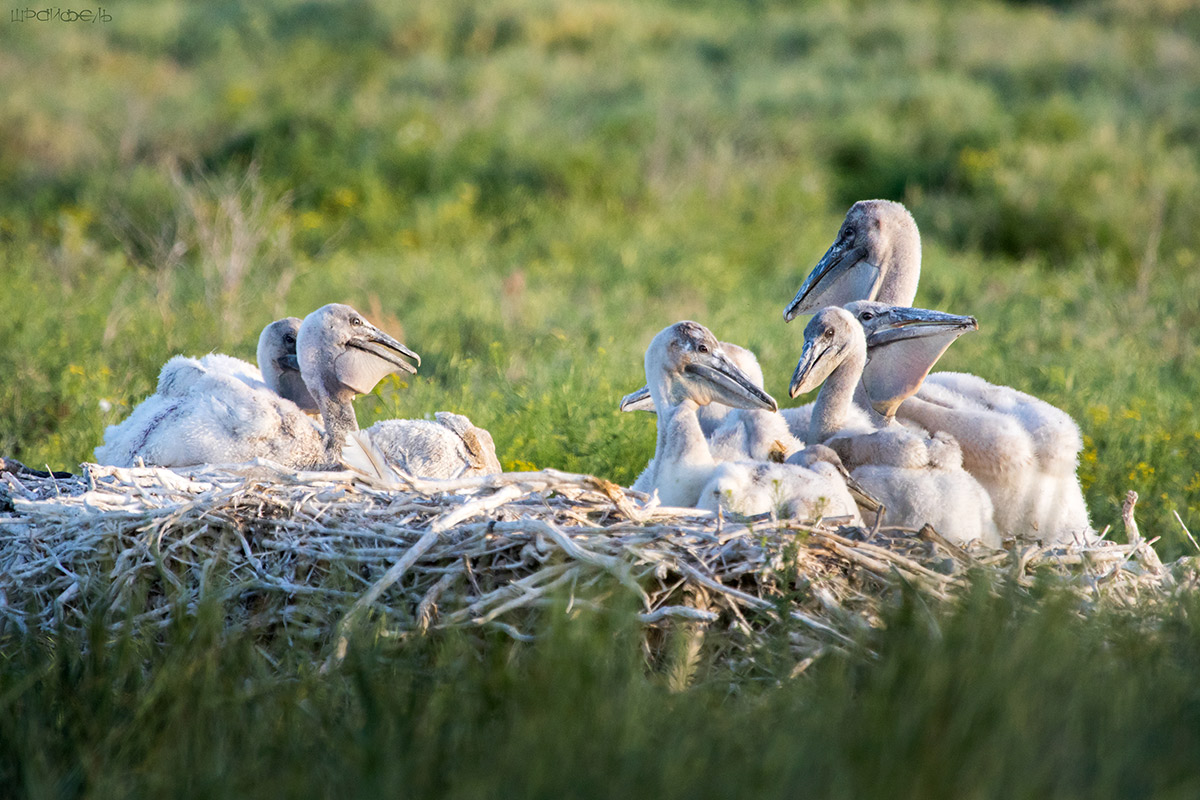 Ростовский заповедник: в центральной части Кума-Манычской впадины, к северу от оз. Маныч-Гудило, в Орловском и Ремонтнеском районах Ростовской области, Орловский район, Ремонтненский район, Ростовская область This image is related to the protected area of Russia number 6100108